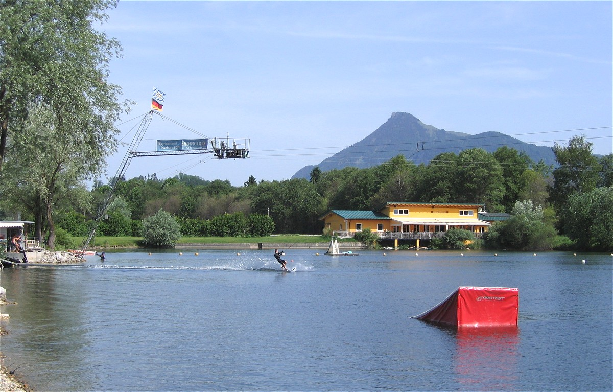 Hödenauersee, Kiefersfelden, Wasserskianlage, im Hintergrund das Kranzhorn